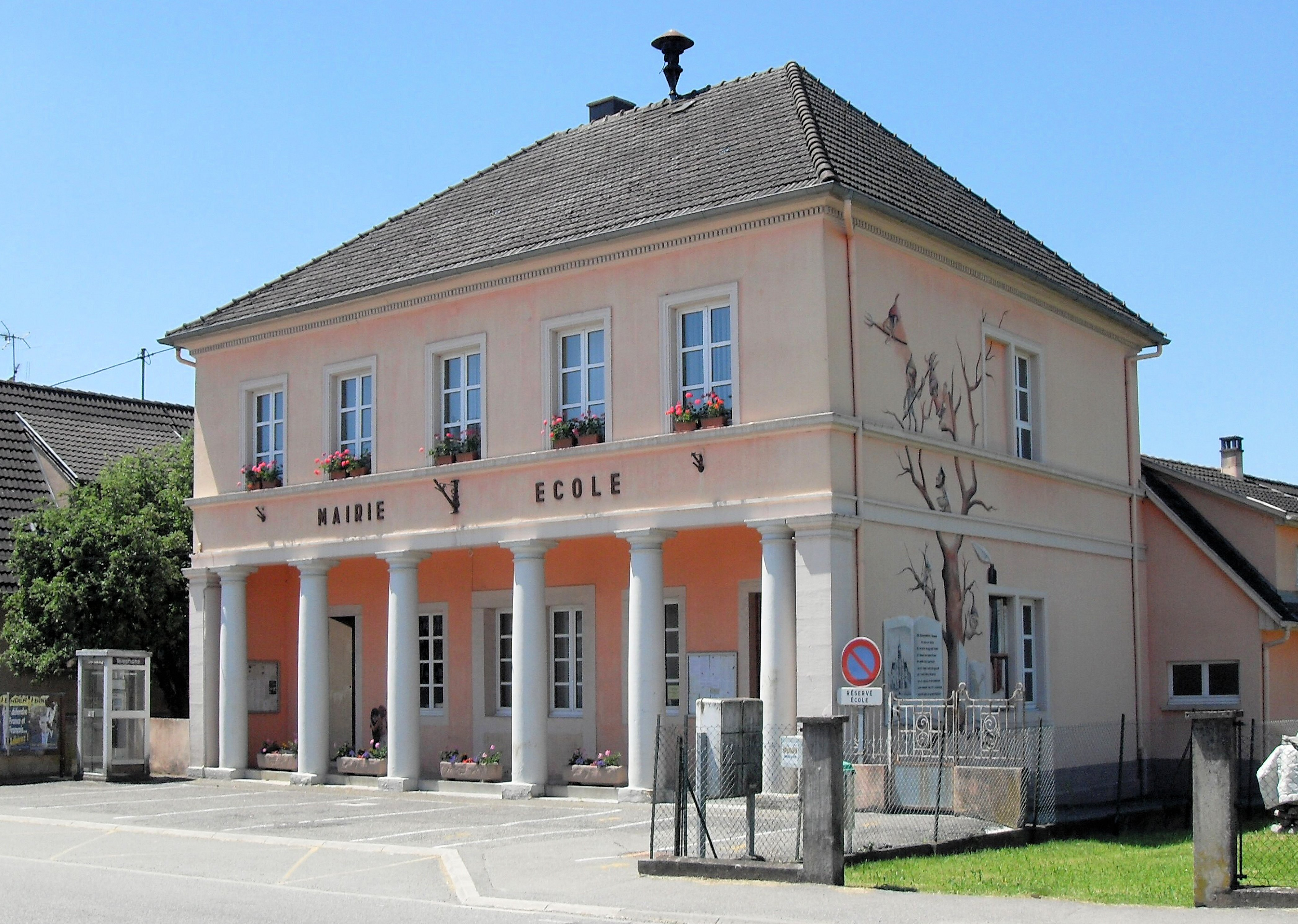 La mairie-école de Ballersdorf